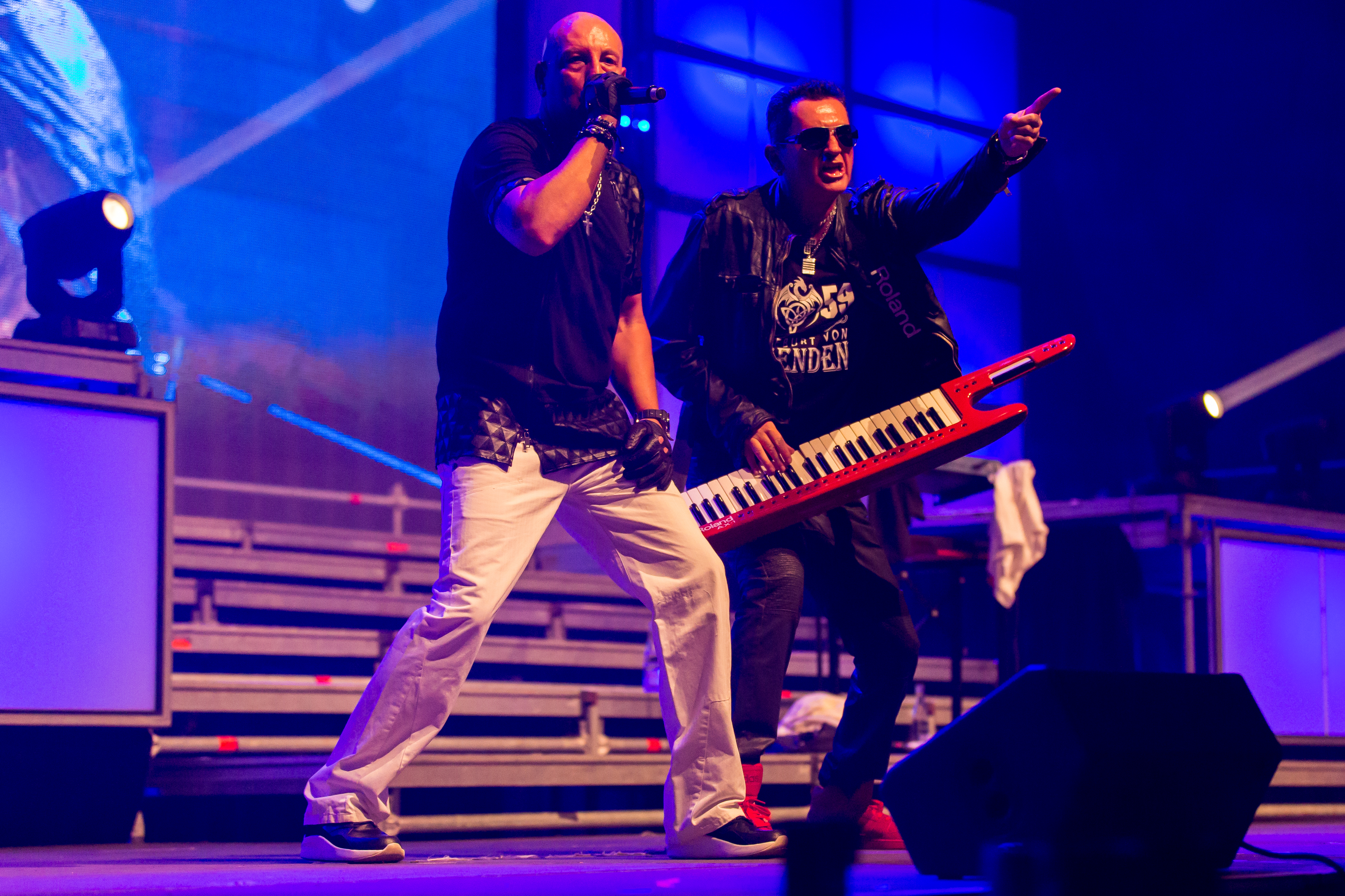 Masterboy feat. Beatrix Delgado during sunshine live "Die 90er - Live on Stage" at Maimarkt Halle, Mannheim, Baden-Württemberg, Germany on 2015-11-28, Photo: Sven Mandel